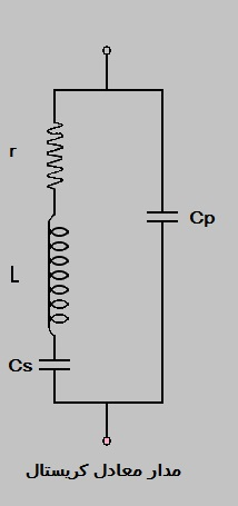 Oscillator